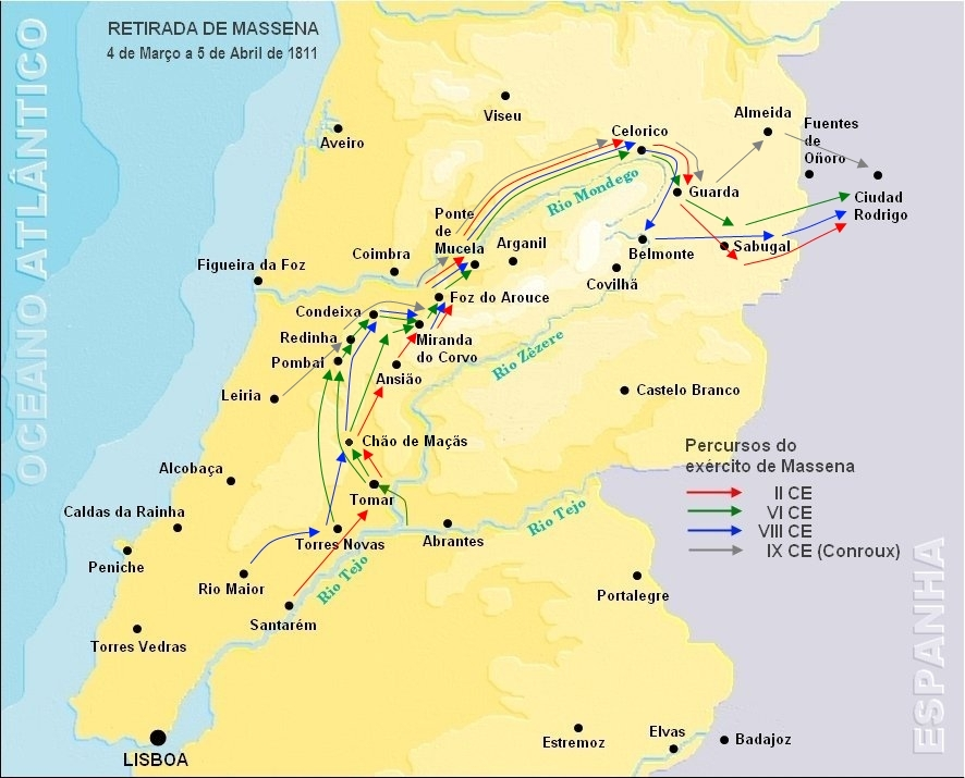 Mapa com percurso das forças do "Exército de Portugal" de Massena durante a retirada em 1811